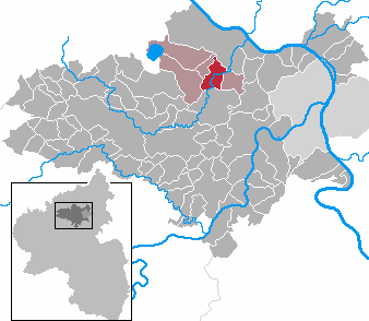 Plaidt in Rhineland-Palatinate - district Mayen-Koblenz